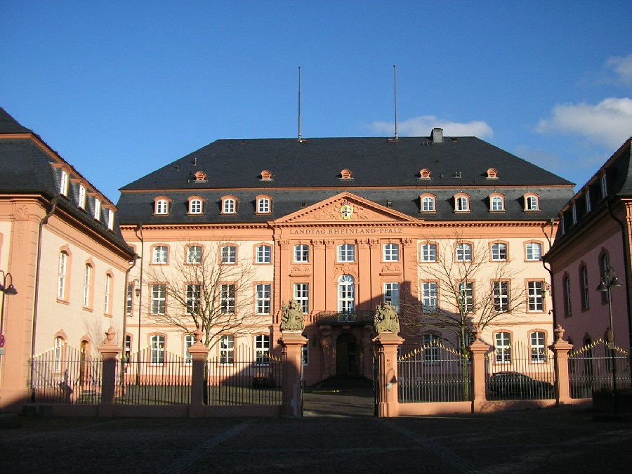 Deutschhaus Mainz (heute Landtagsgebäude Rheinland-Pfalz).